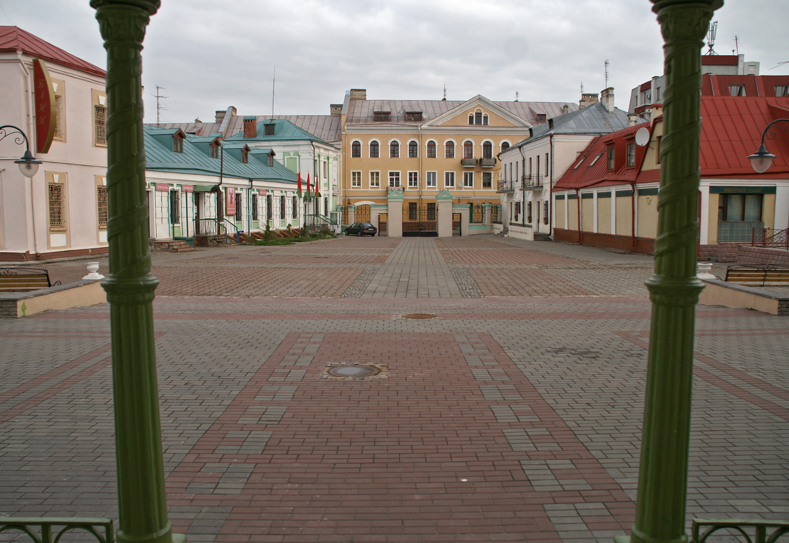 Беларуская (тарашкевіца): Былы архірэйскі палац. г. Магілёў This is a photo of Belarusian heritage monument. Reference number: 511Г000025 ( WLM)